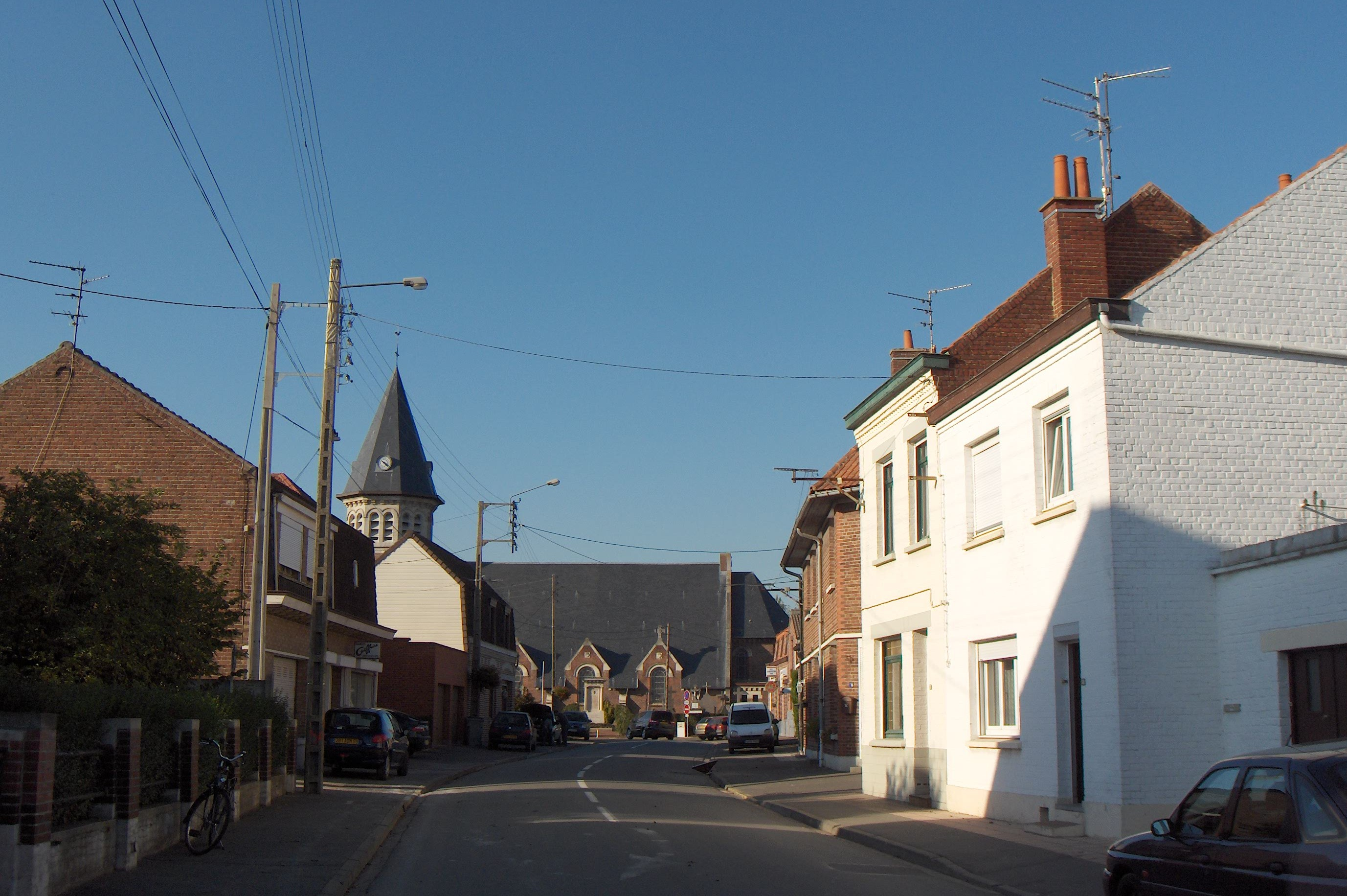 Fromelles (France, dept. Nord), centre du village, vue de la rue de l'église